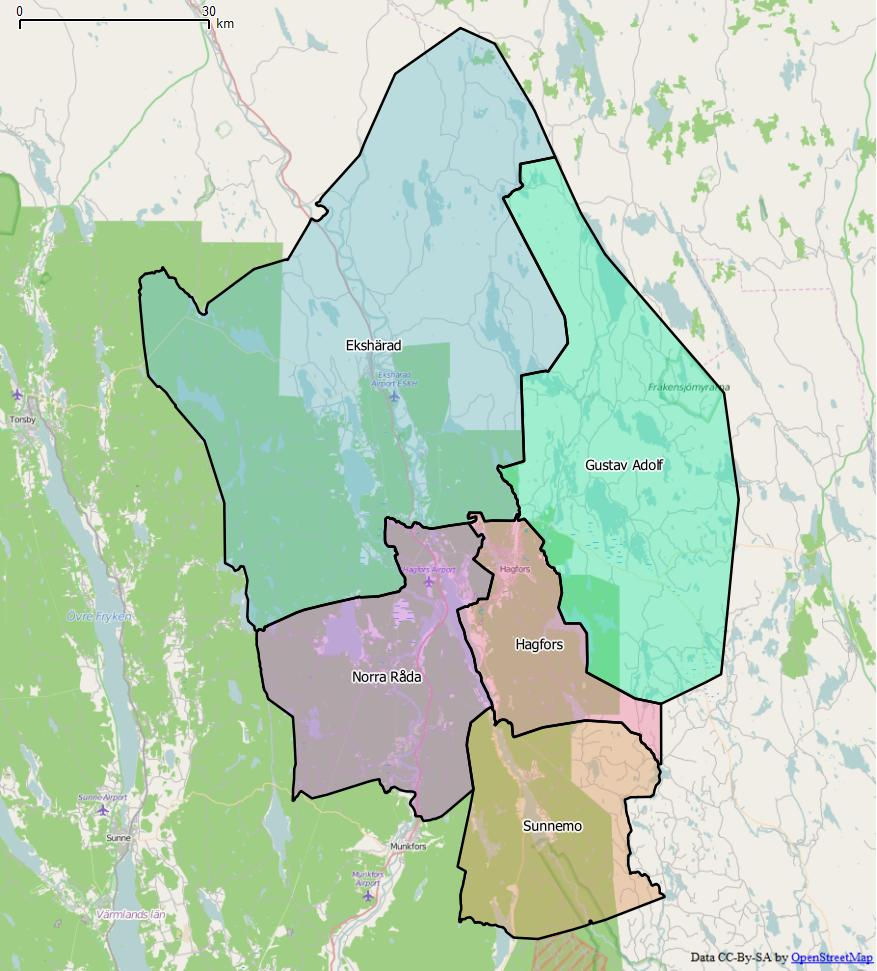 Distriktsindelningen i Hagfors kommun